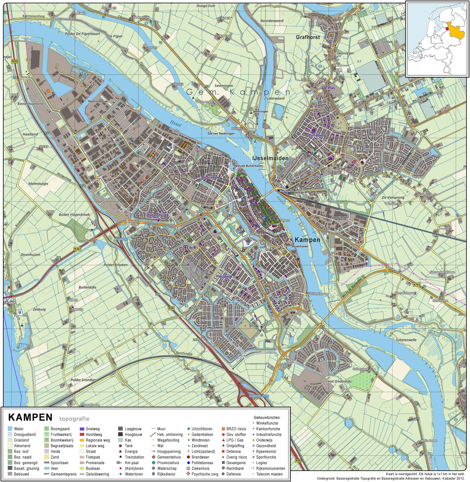 Topografisch beeld van de stad Kampen. Op basis van de GML open geodata van de BRT/Top10NL (basisregistratie Topografie, Kadaster 2012), vrijgegeven door Kadaster op 30-11-2012 onder de Creative Commons BY licentie. Gebouwvlakken vanuit Open Geodata BAG extract (december 2012). Samenstelling en kleurenschema: Jan-Willem van Aalst.